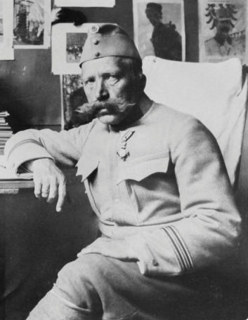 Padre Fabiano Barcatta (1868-1954)